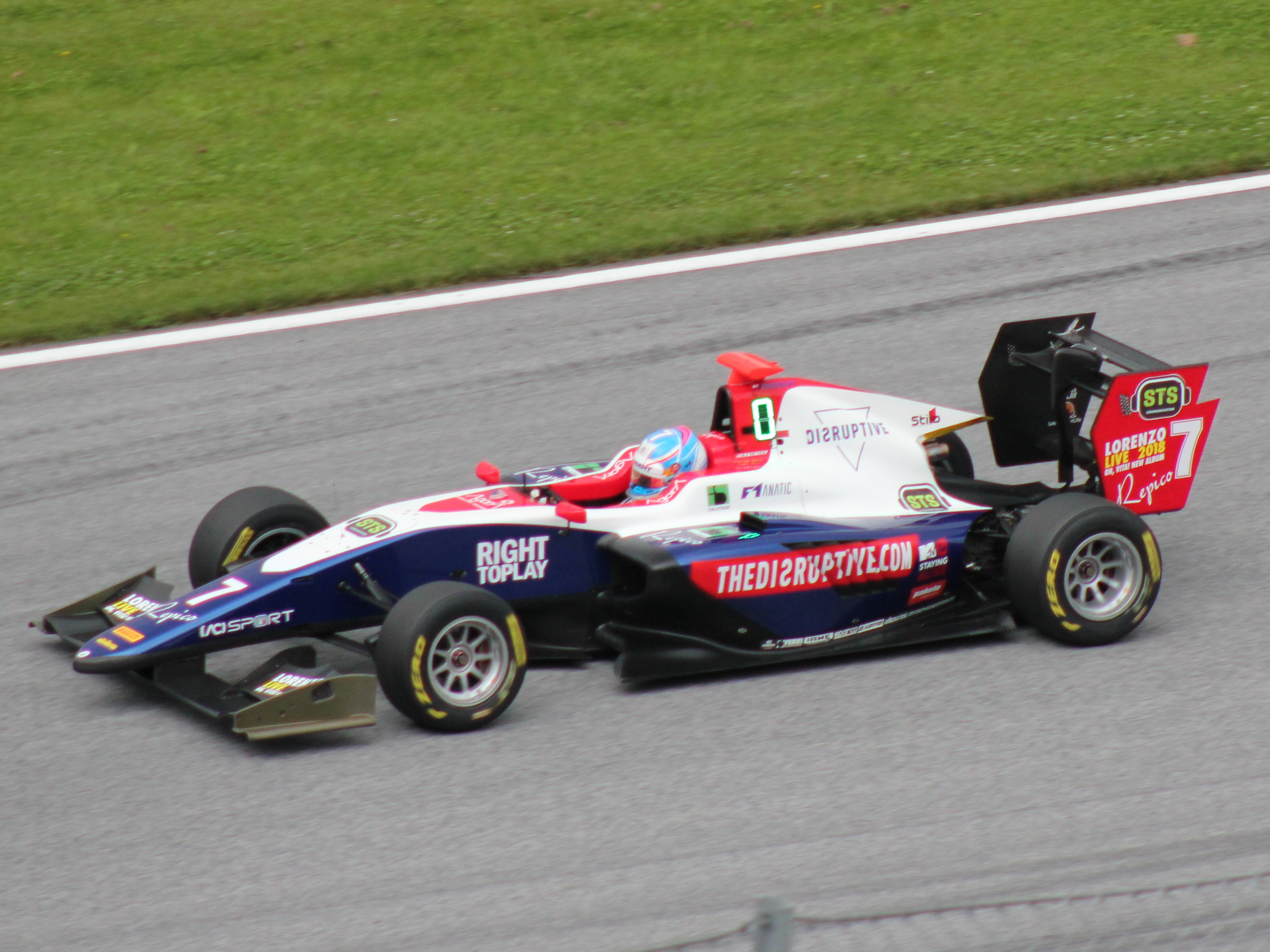 07 Ryan Tveter beim Rennwochenende in Österreich 2018